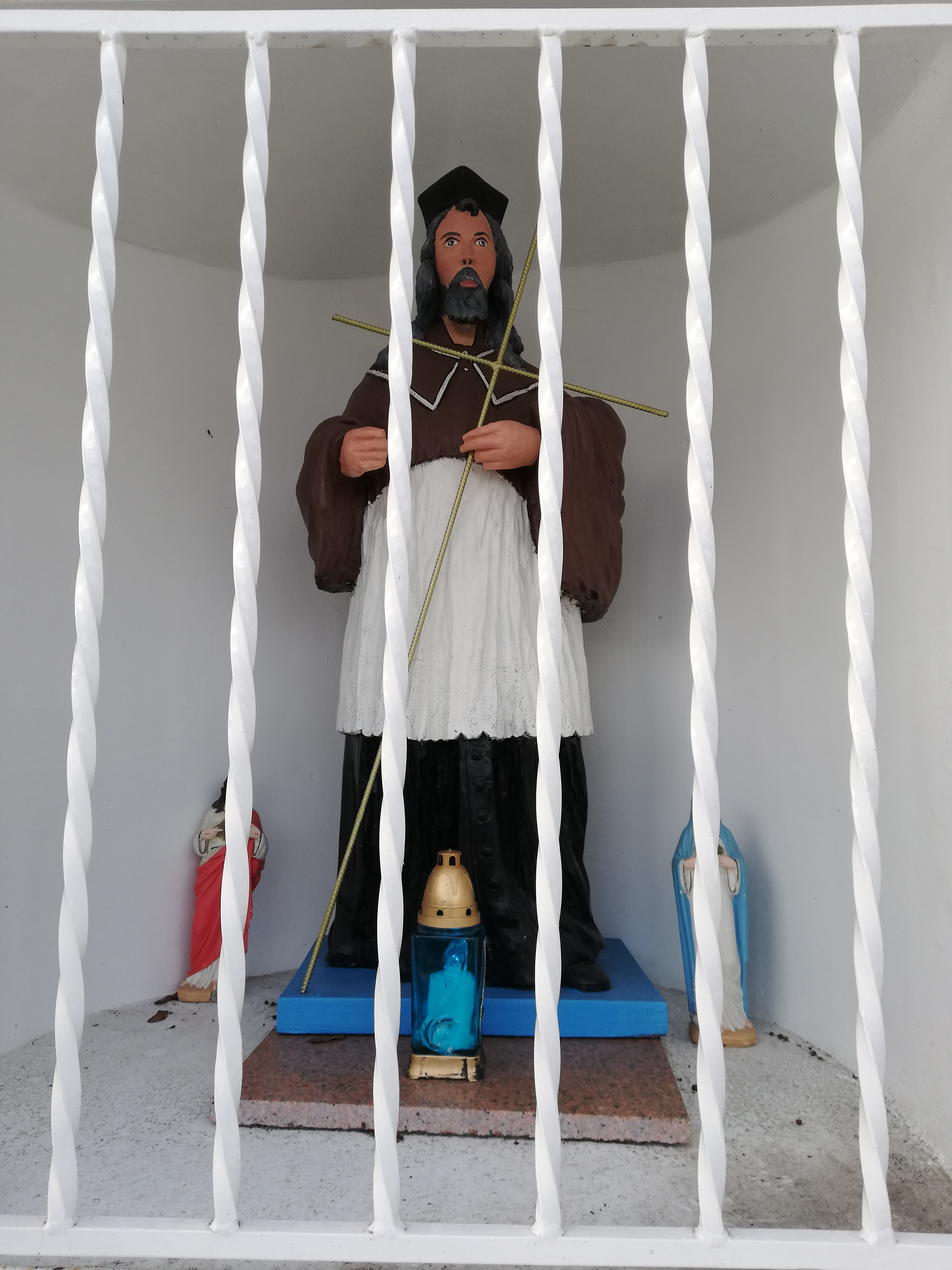 Figura Św. Jana Nepomucena przy kościele Trójcy Przenajświętszej w Zambrowie